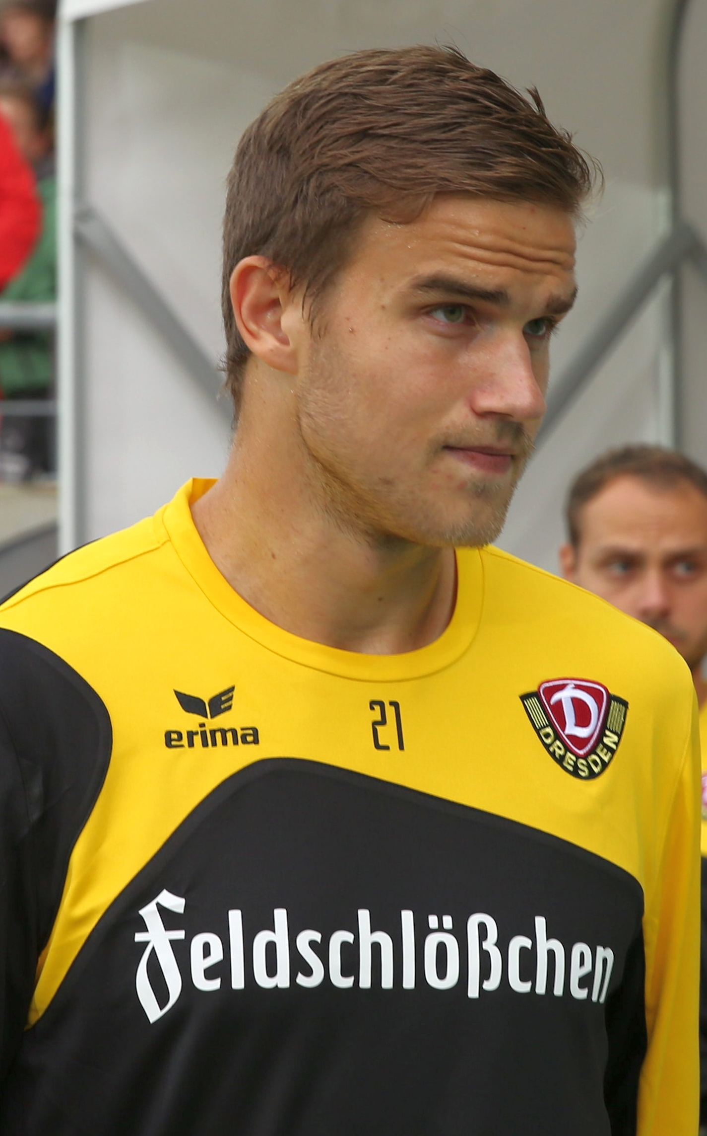 DFB-Pokal 2017/18, 1. Hauptrunde, TuS Koblenz gegen SG Dynamo Dresden: Eero Markkanen (SG Dynamo Dresden)